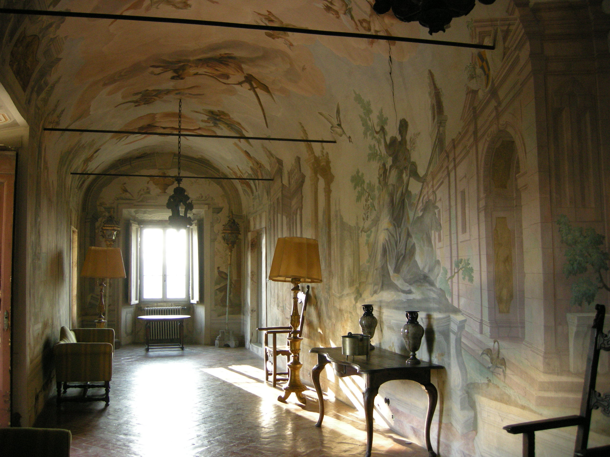 Villa Giogolirossi, affreschi